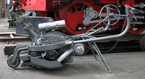 Einachsschieber